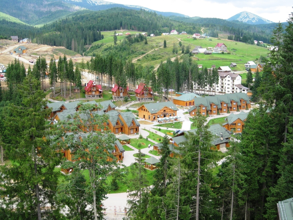 no original description